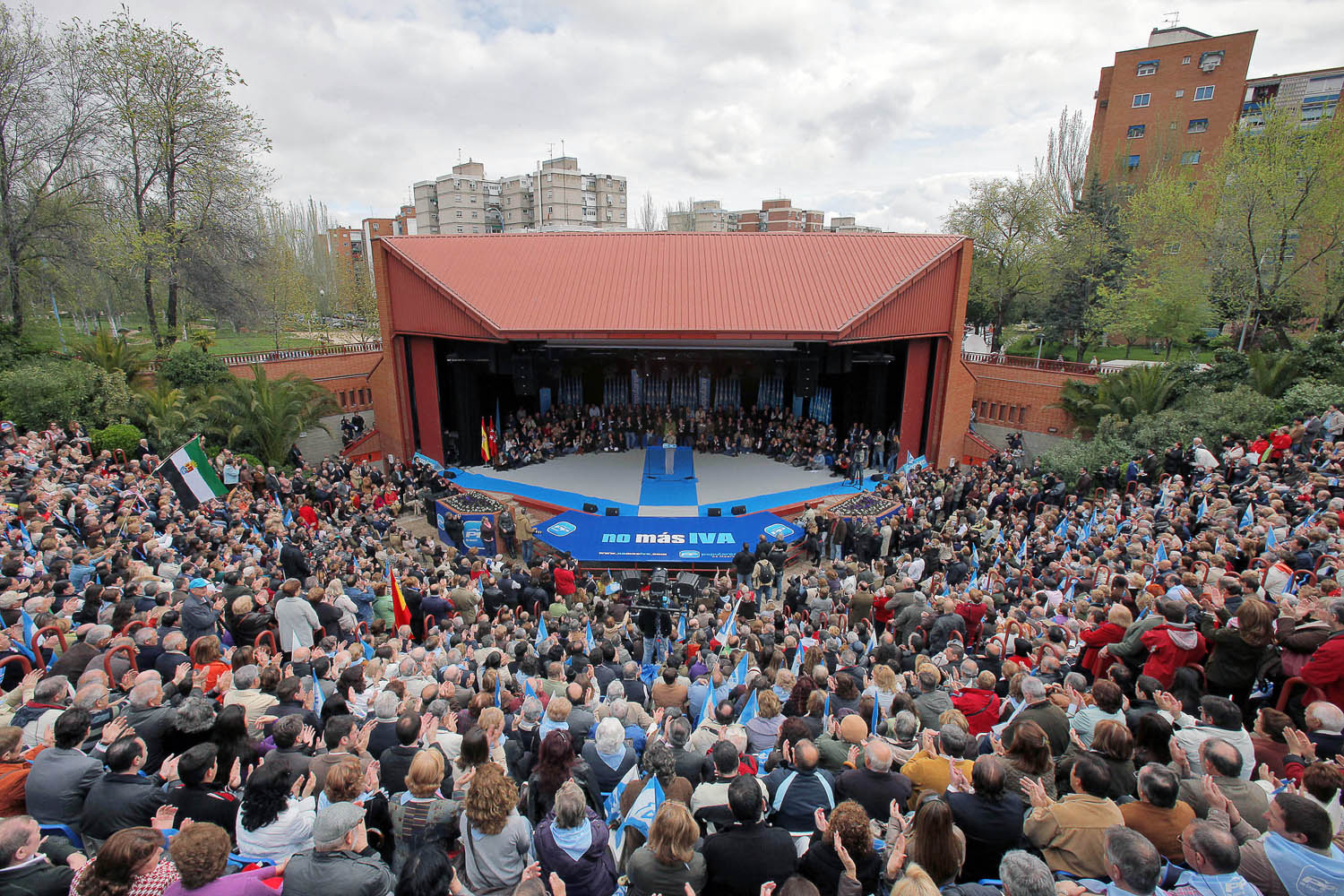 Comienza en Leganés